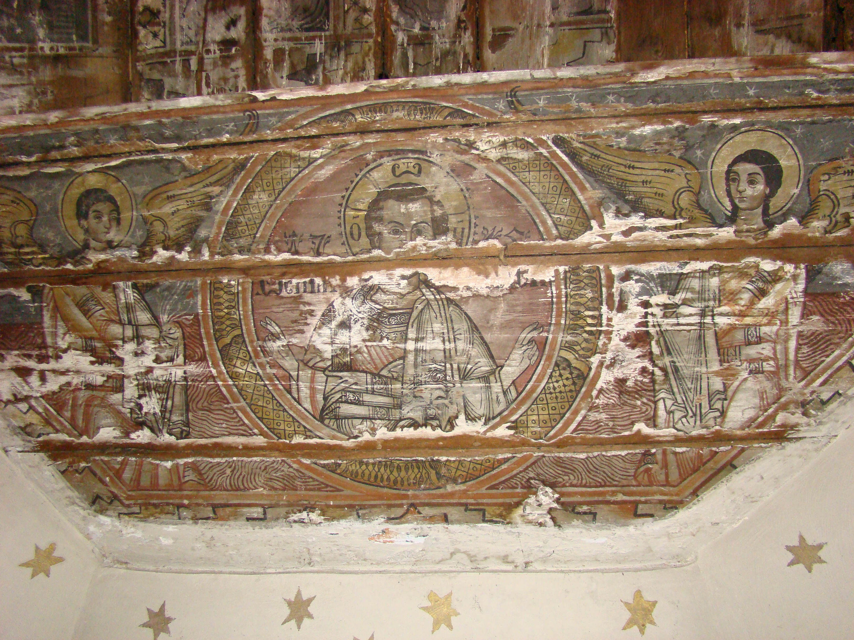 Biserica de lemn „Sfântul Nicolae” din Bădeni, județul Cluj